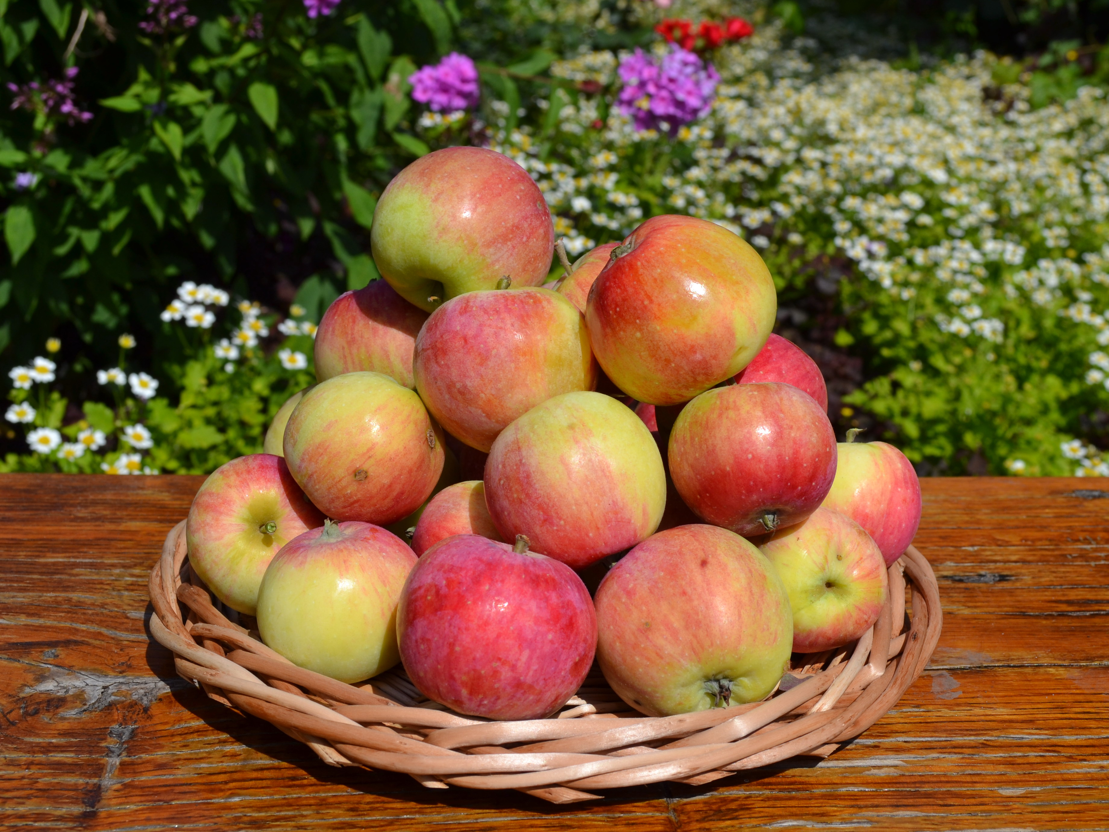 Сорта Абориген. 8 августа 2015 года. Башкирия, Иглинский район. Фото Виталий Брыкин